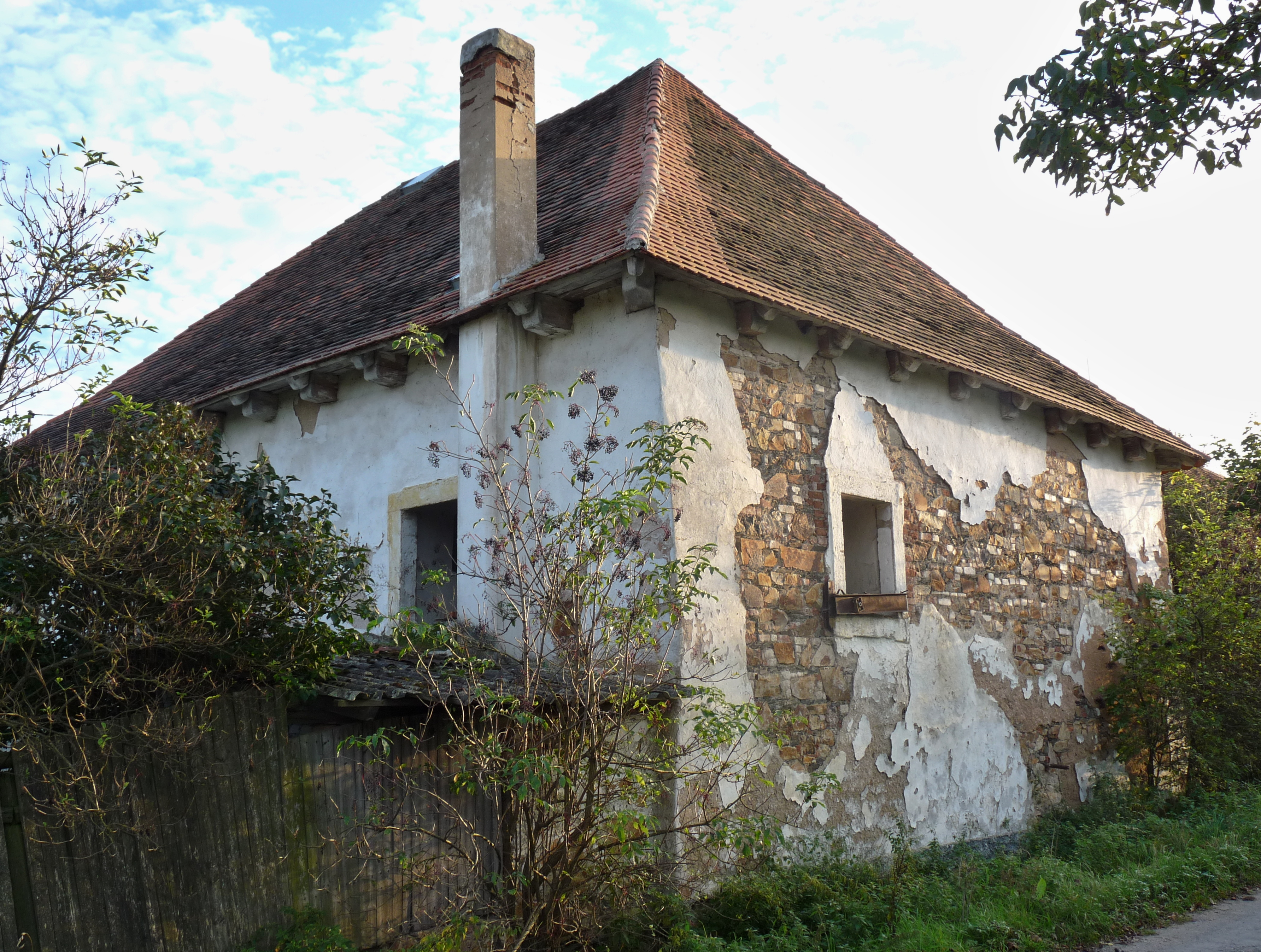 Zemědělský dvůr Sechutice, Hadačka 20, Hadačka.